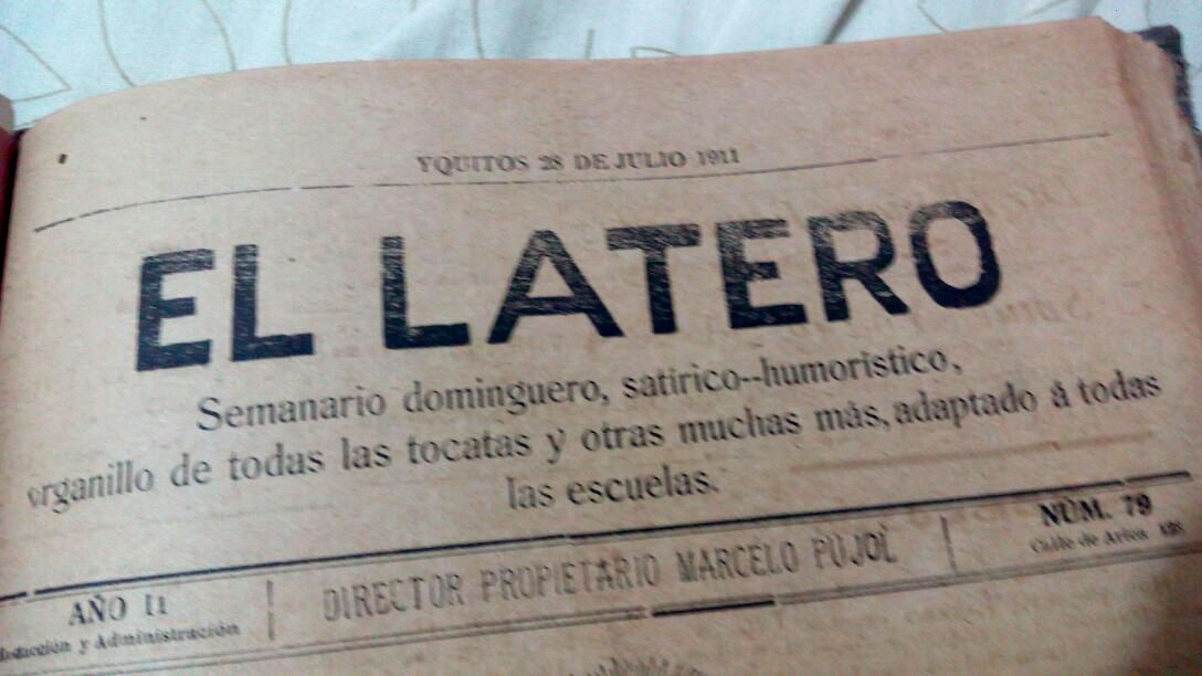 El Latero, diario del Perú que sirculaba en Iquitos.